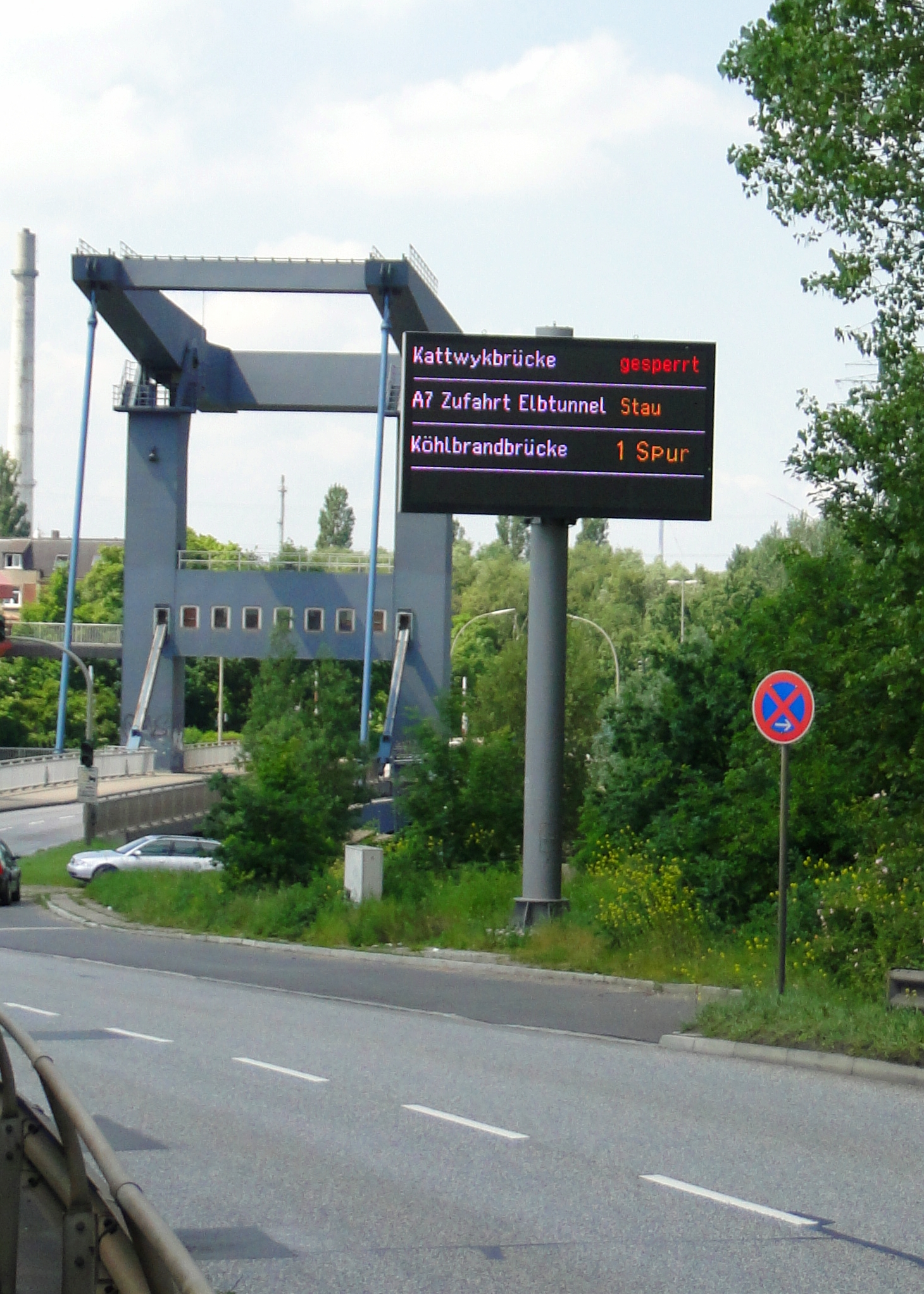 Verkehrsbeeinflussungsanlage DIVA im Hamburg Hafen (hier: an der Reiherstieg-Klappbrücke)